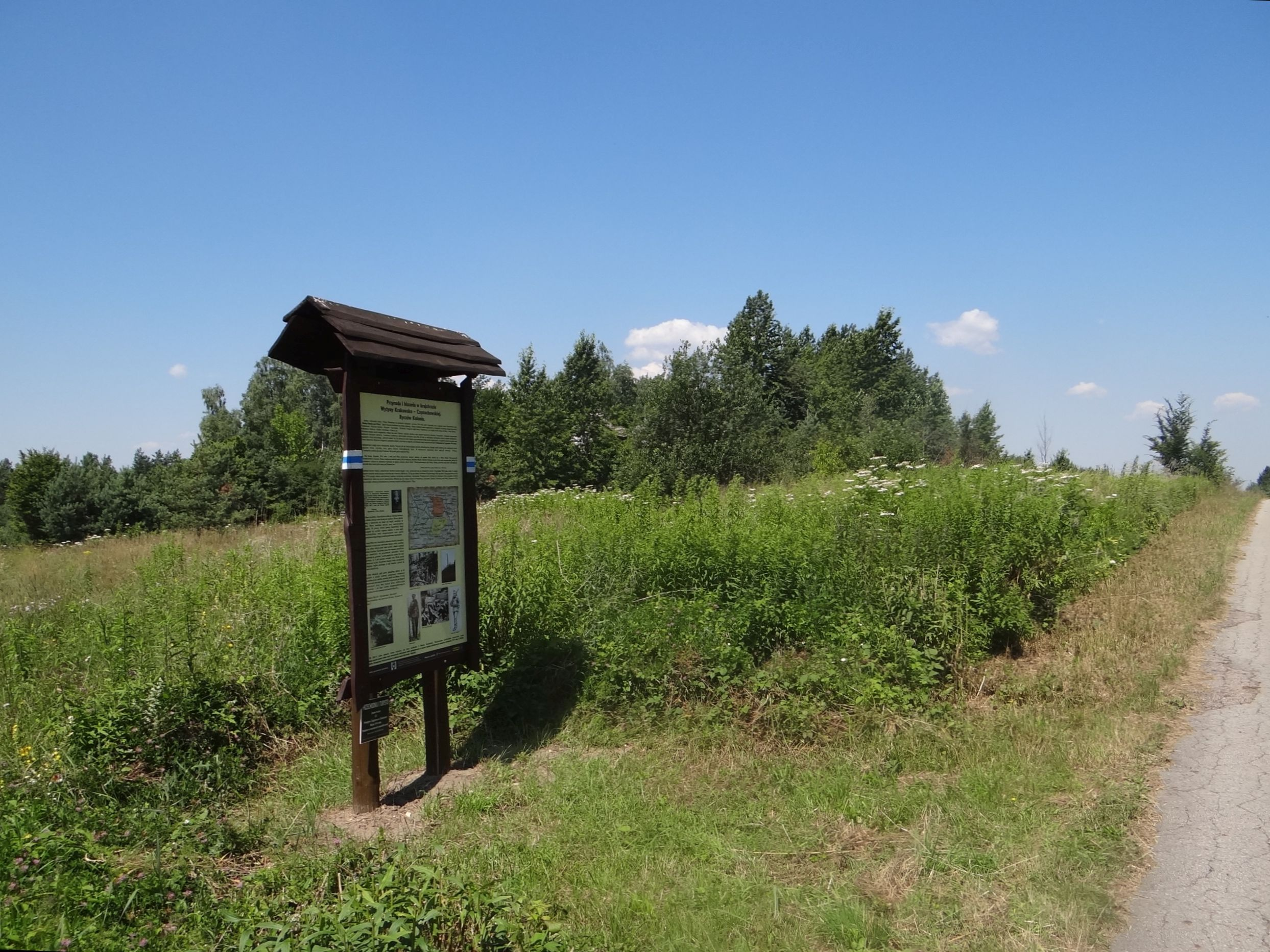 Wzniesienie Felinkowa w Ryczowie